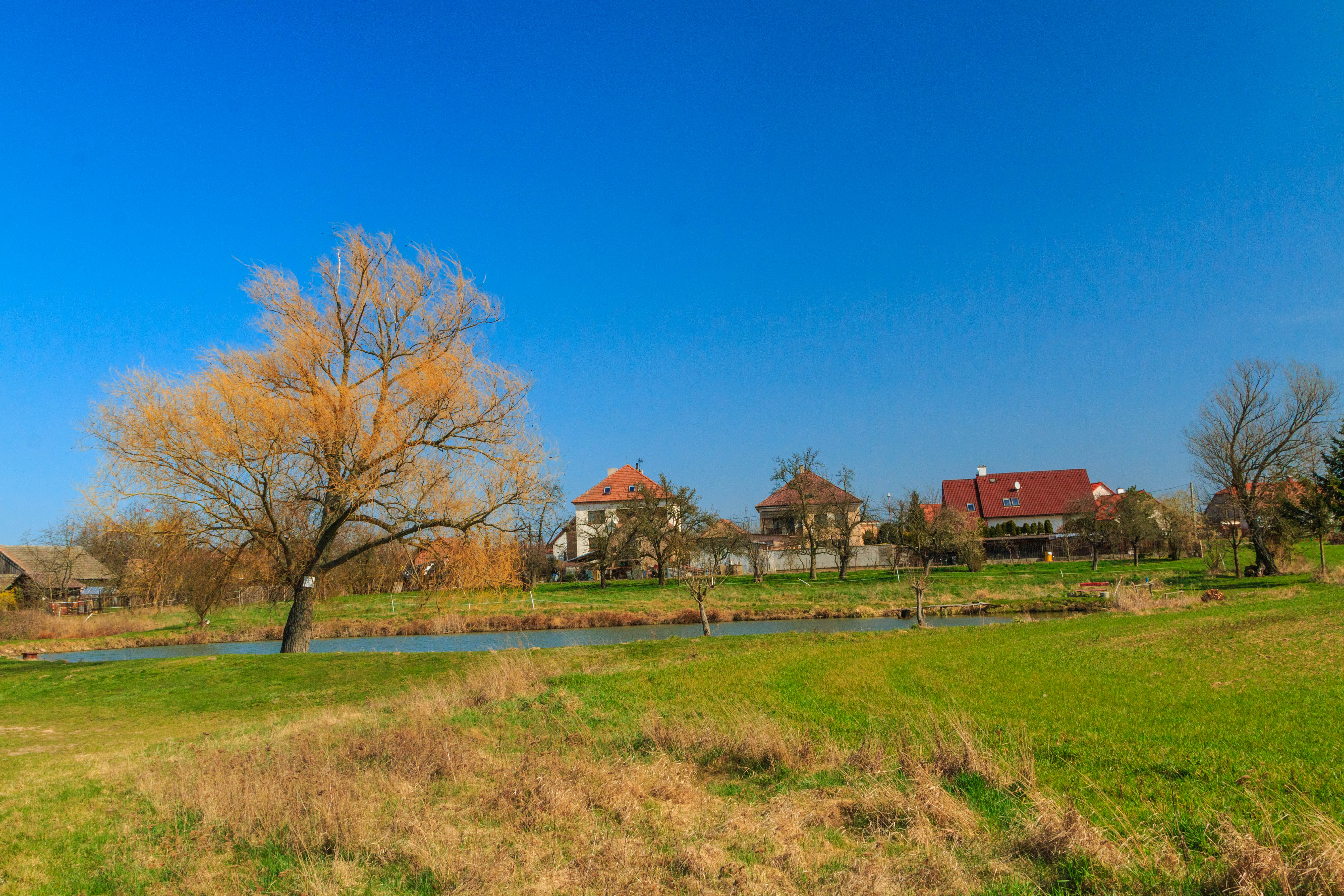 Rybník Sádka u Barchova Project: Vodstvo.